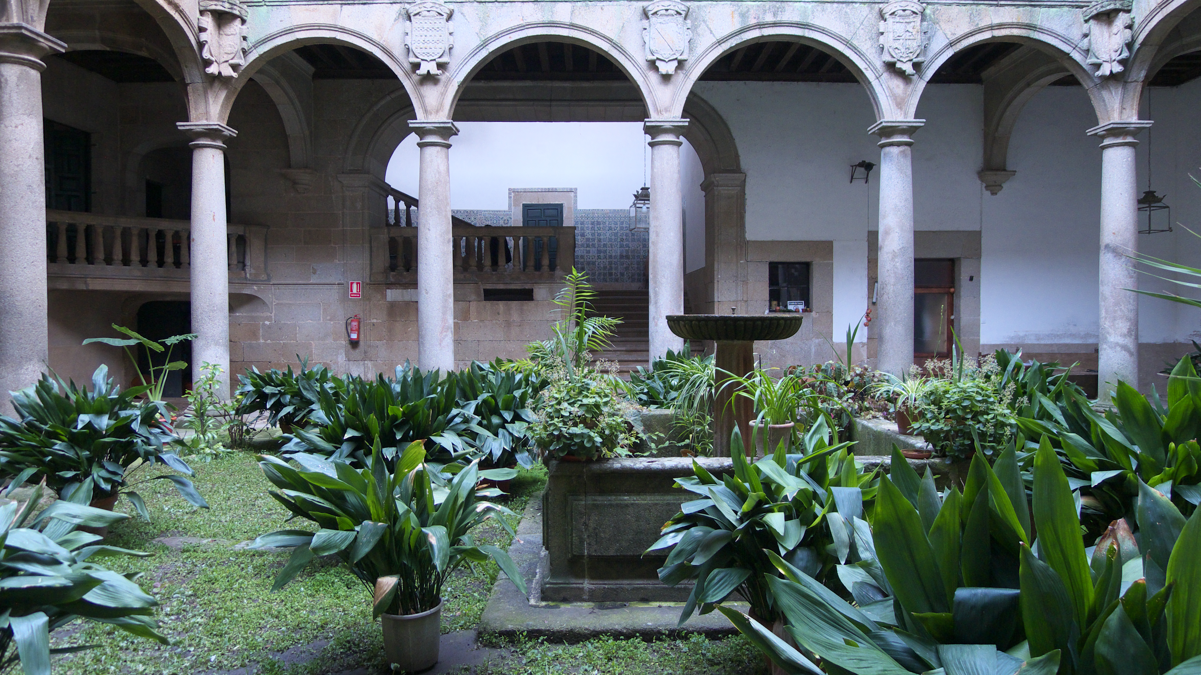 Palacio del Marqués de Mirabel (Patio). Los Reyes Católicos conceden el Ducado de Plasencia a don Álvaro de Zúñiga y Guzmán (1476)